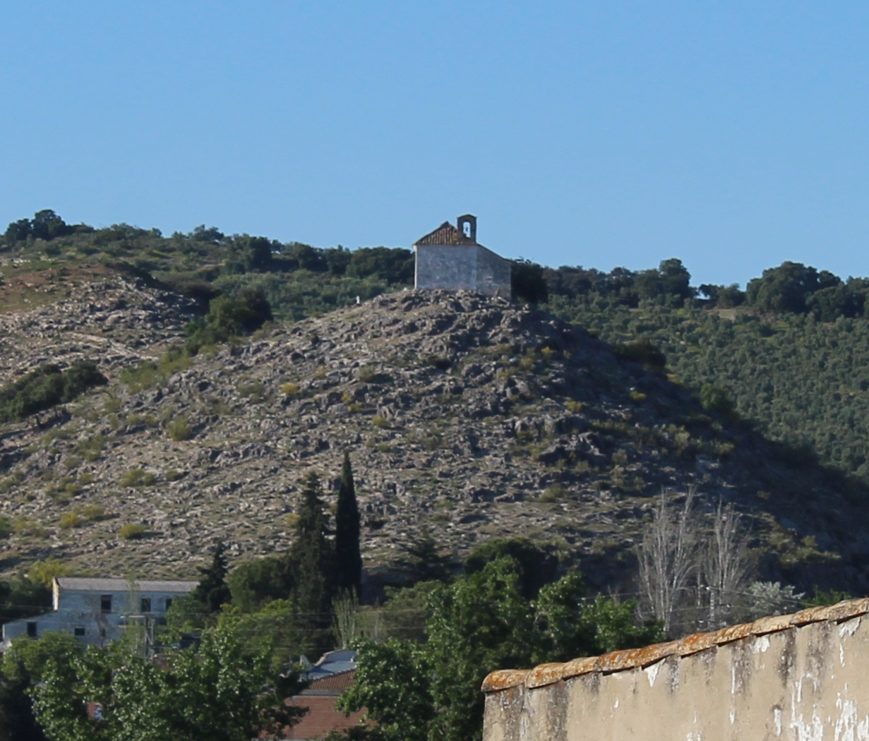 Ermita del Calvario de Cabra